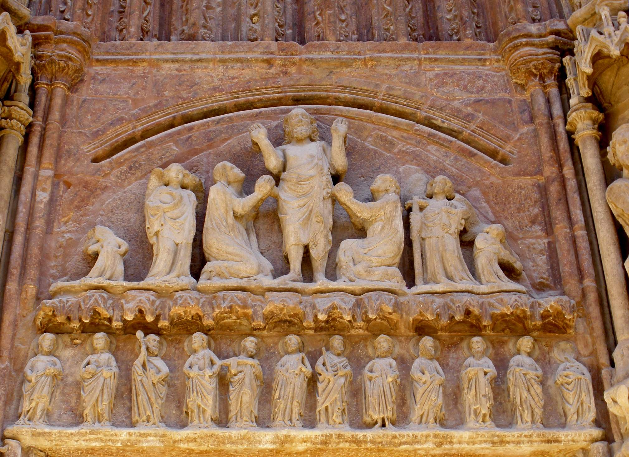 Iglesia de San Bartolomé, Logroño (La Rioja)